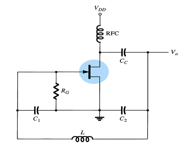 Circuito de um oscilador Colpitts usando um FET.